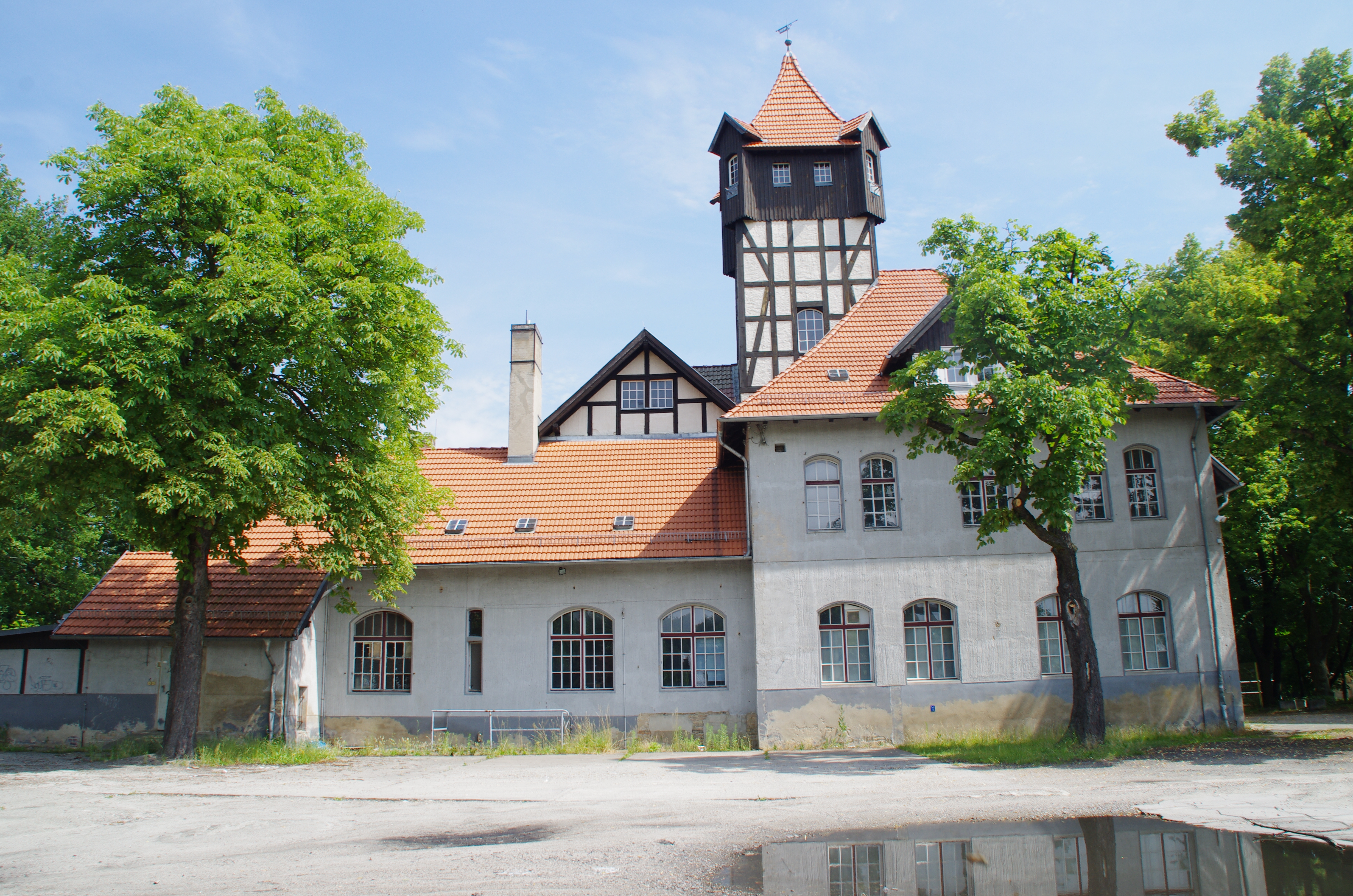 Trebbin in Brandenburg. Das Schützenhaus in der Ebelstraße 17 steht unter Denkmalschutz.